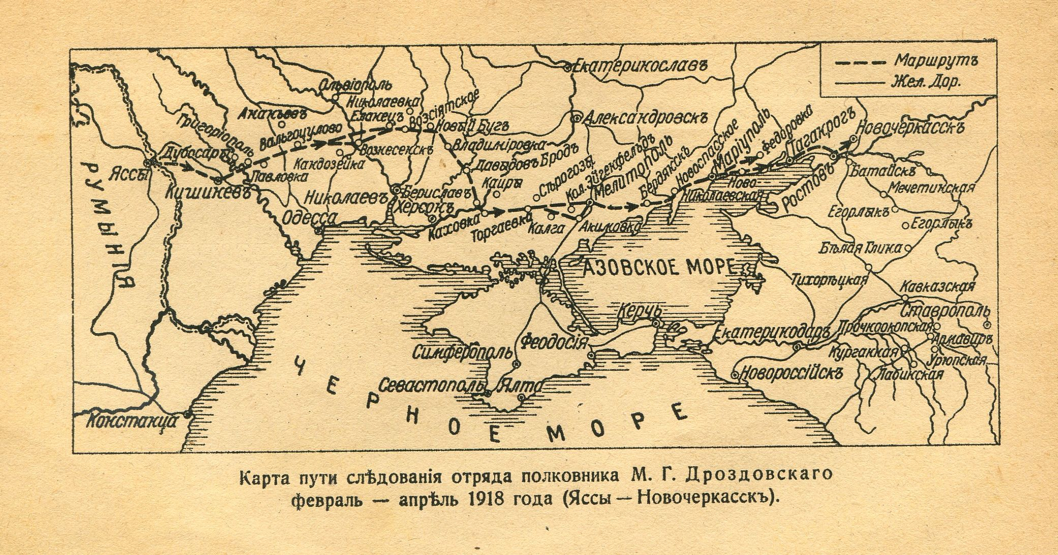 Карта пути слѣдованія отряда полковника М.Г. Дроздовскаго / февраль - апрѣль 1918 (Яссы - Новочеркасскъ).